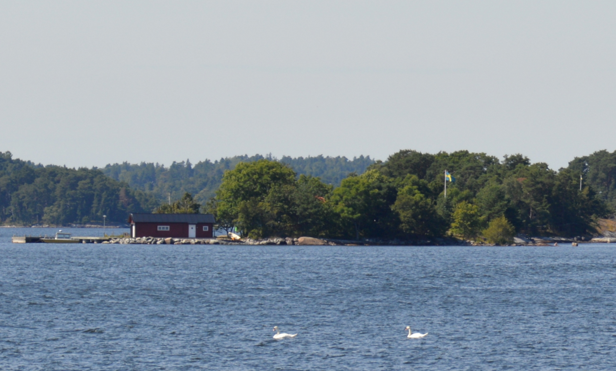 Lilla Batsholmen